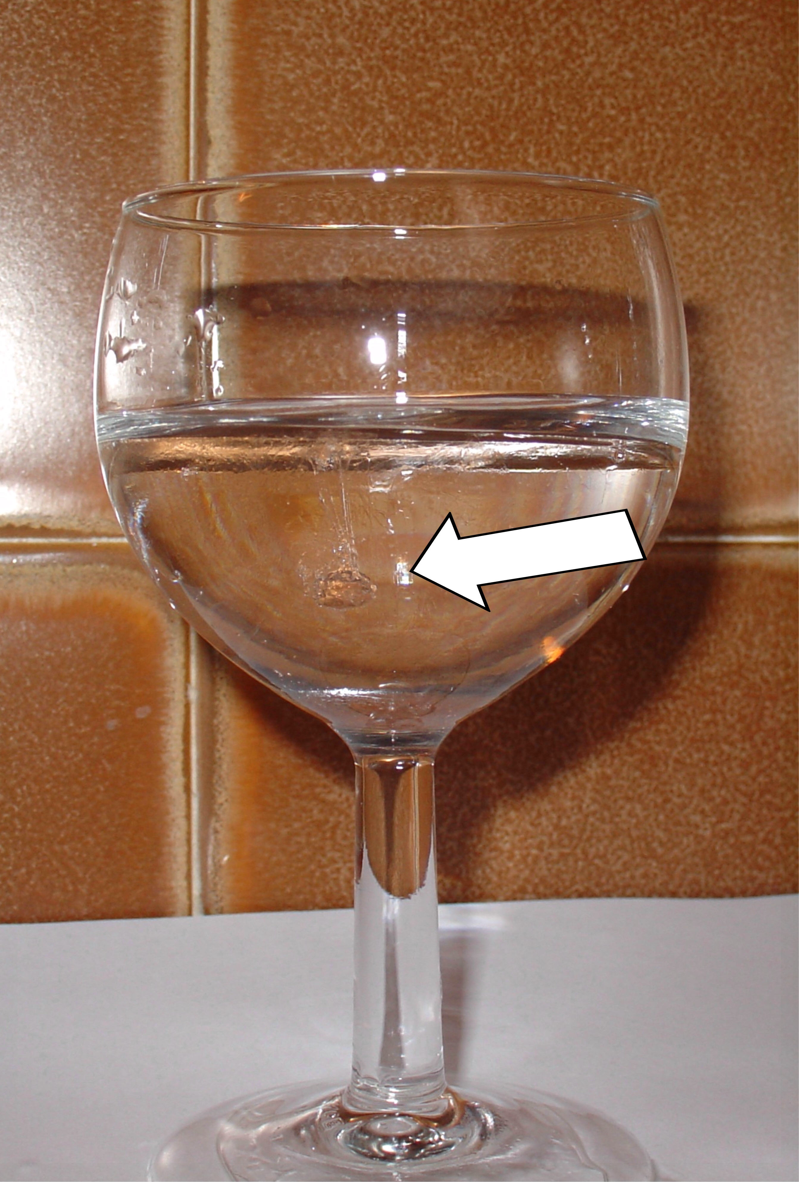 Description : test utilisé pour juger de la cuisson optimale de la gelée de coings. On observe la formation d'une perle lorsque l'on fait tomber la gelée dans un verre d'eau. Source : image personnelle